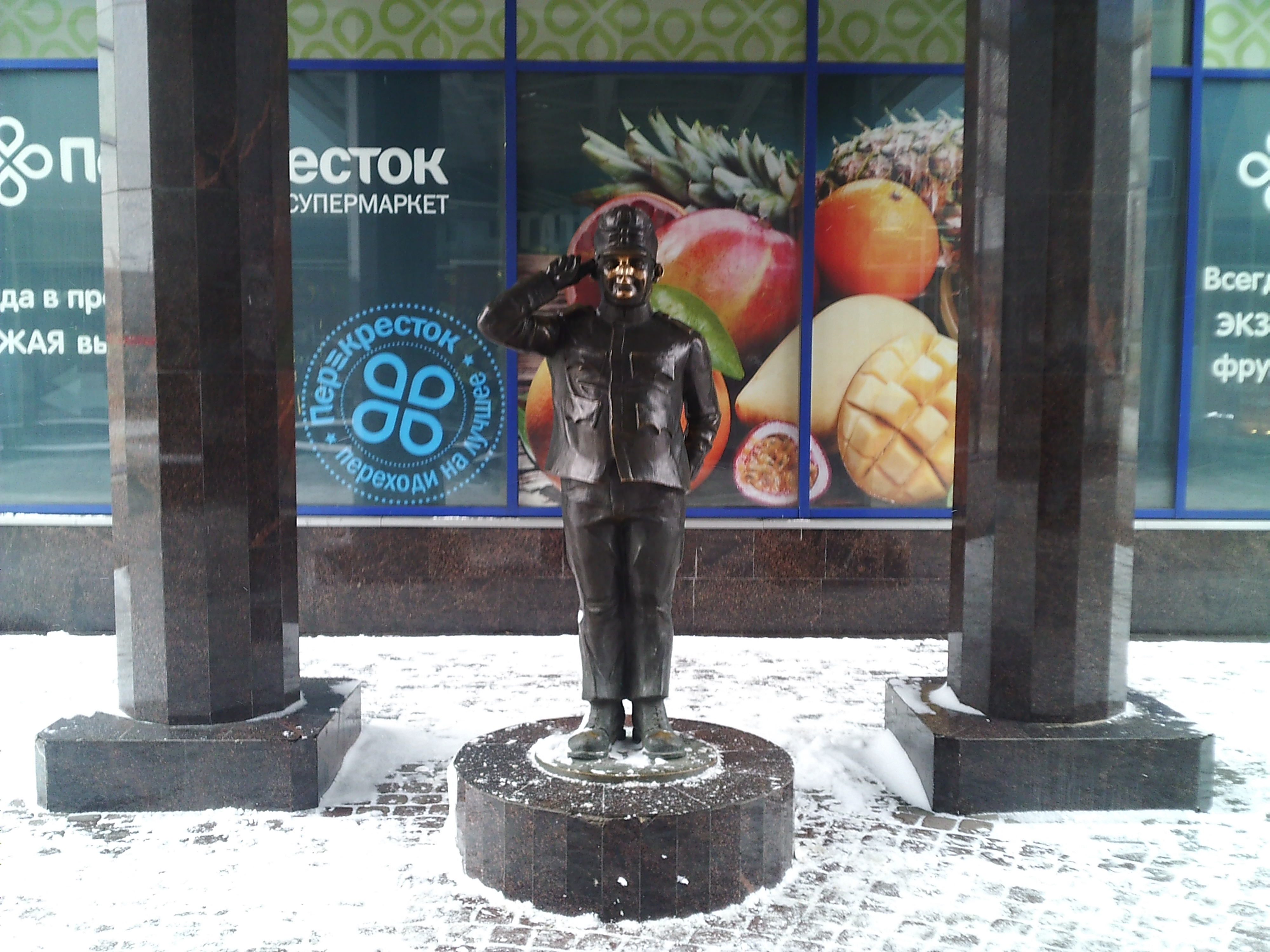 Автор фотографии: Andy Spb, собственная работа